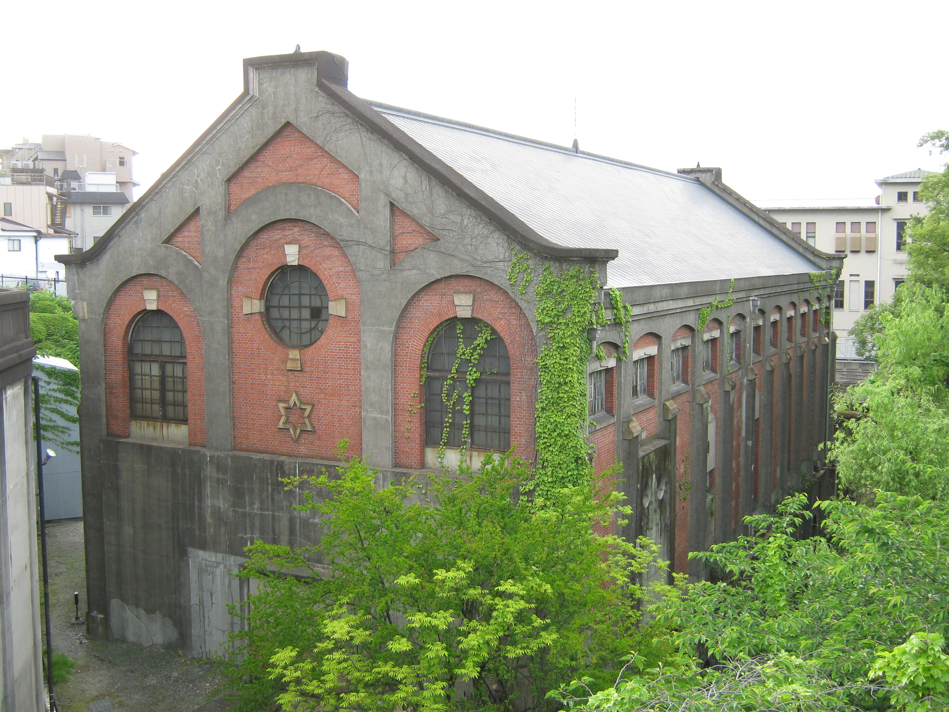 蹴上発電所の第二期建屋。